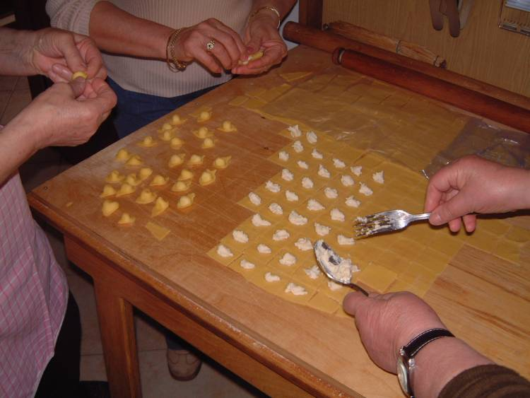 Je suis l'auteur de cette photo prise en avril 2007